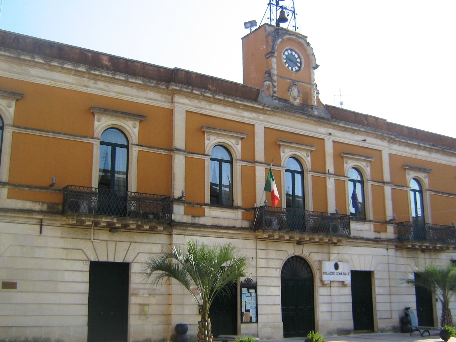 Palazzo Comunale di Calimera